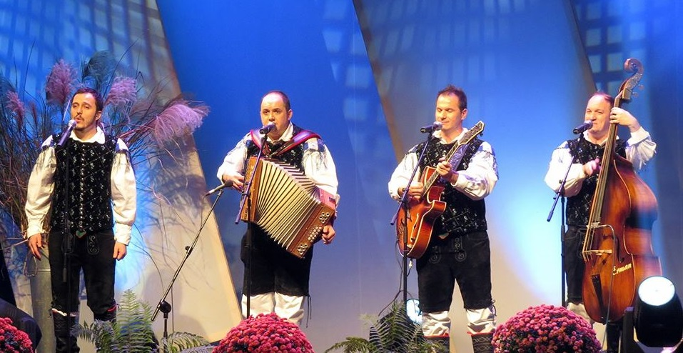 Modrijani na koncertu Ansambla Spev v Velenju.